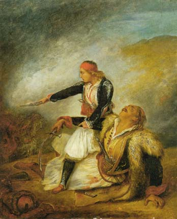 painting